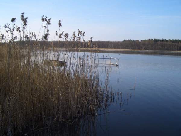 Blick vom Südufer auf den Großen Peetscher See.